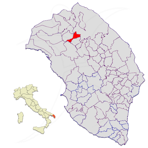 Il territorio del comune di Arnesano nella provincia di Lecce